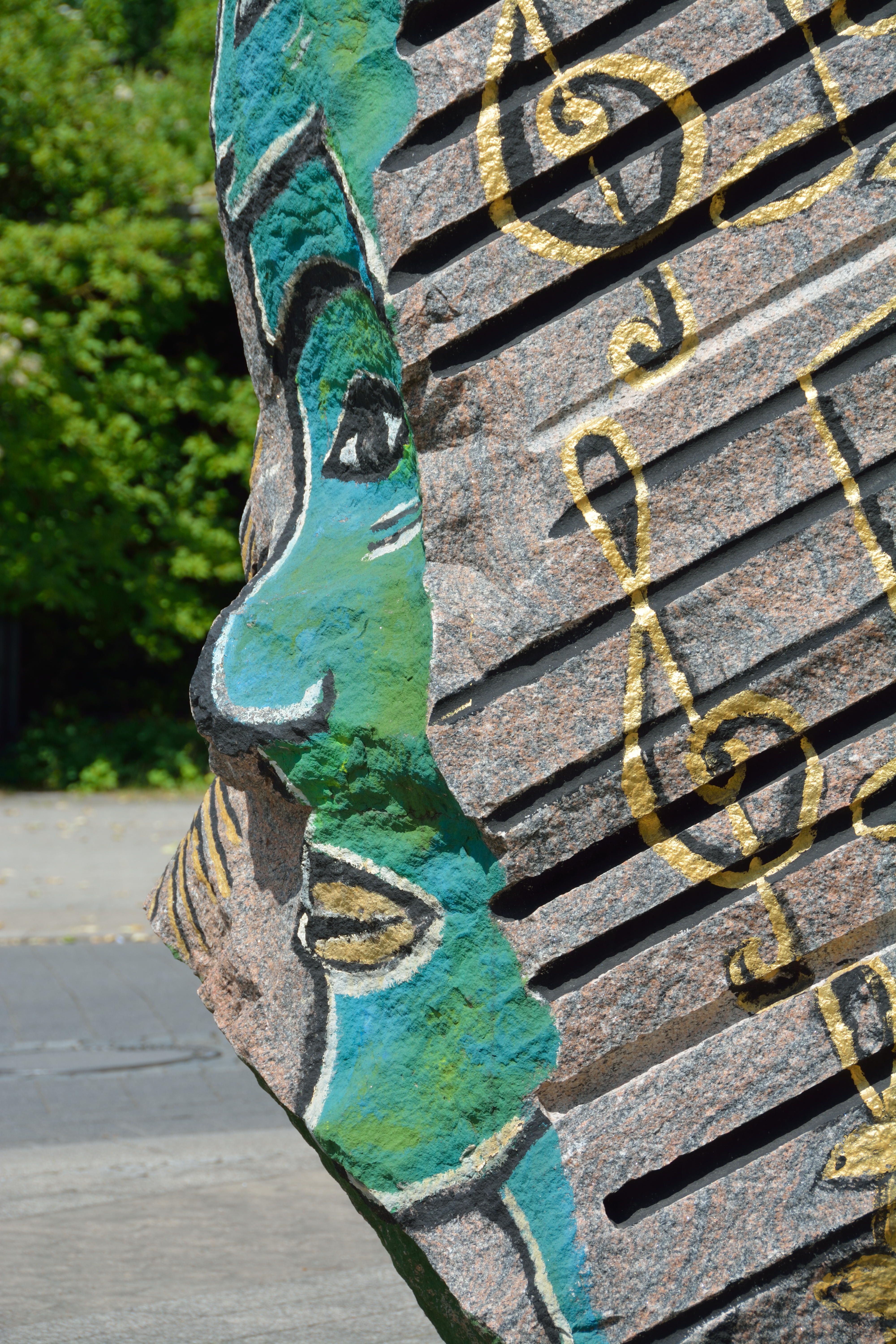 Der Weg in Uelzen vom Hundertwasserbahnhof in die Innenstadt wird von 21 Steinskulpturen der Künstlerin Dagmar Glemme gesäumt. Dies ist der "Stein der Flora".